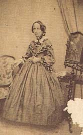 Sorella di Giacomo Leopardi